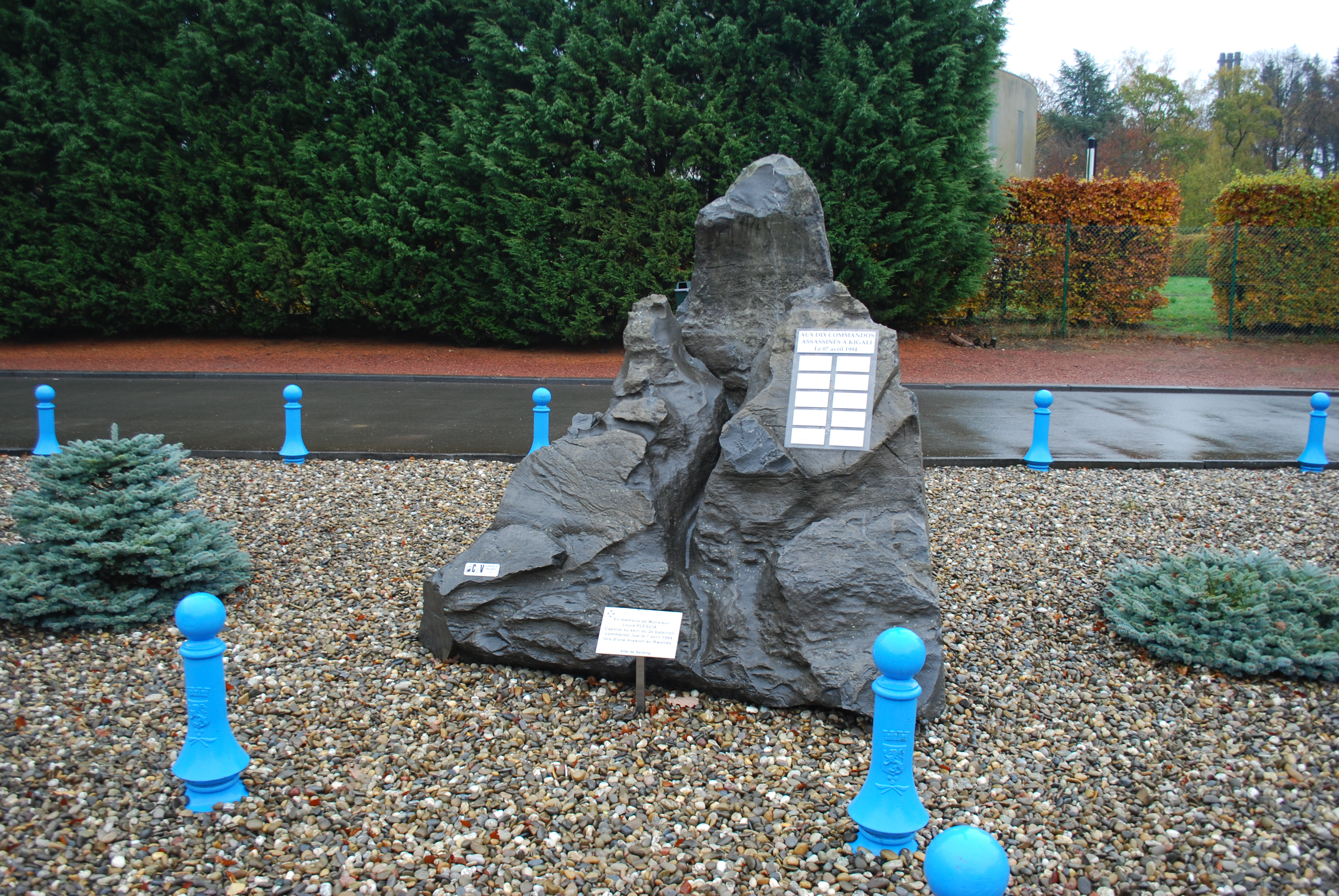 Le cimetière de la Cense Rouge, sur les hauteurs de Liège (commune de Seraing, Belgique).